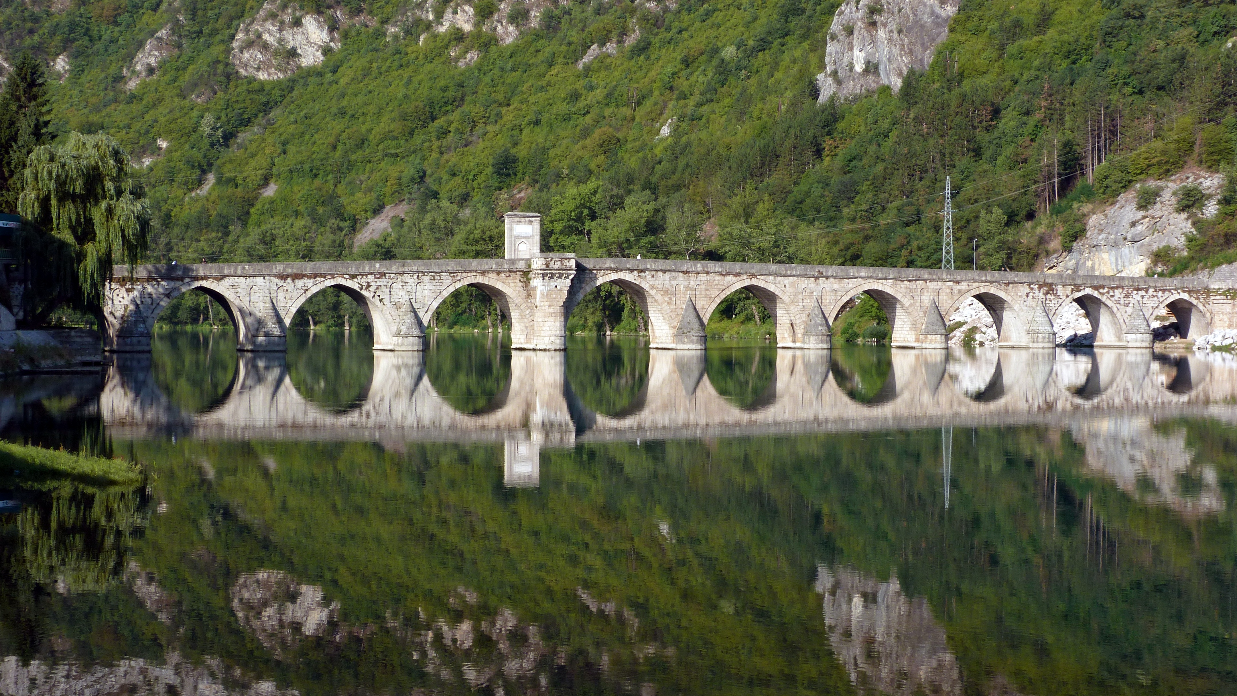 Visegradska Cuprija idealna za fotografiju kada se voda mirna, onda do izrazaja dolazi odraz mosta u vodi cime most dobija jos vecu car. This image was uploaded as part of Trace of Soul 2015.